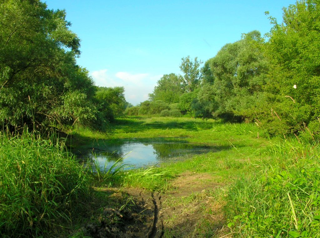 Mała Kępa Ostromecka k. Bydgoszczy